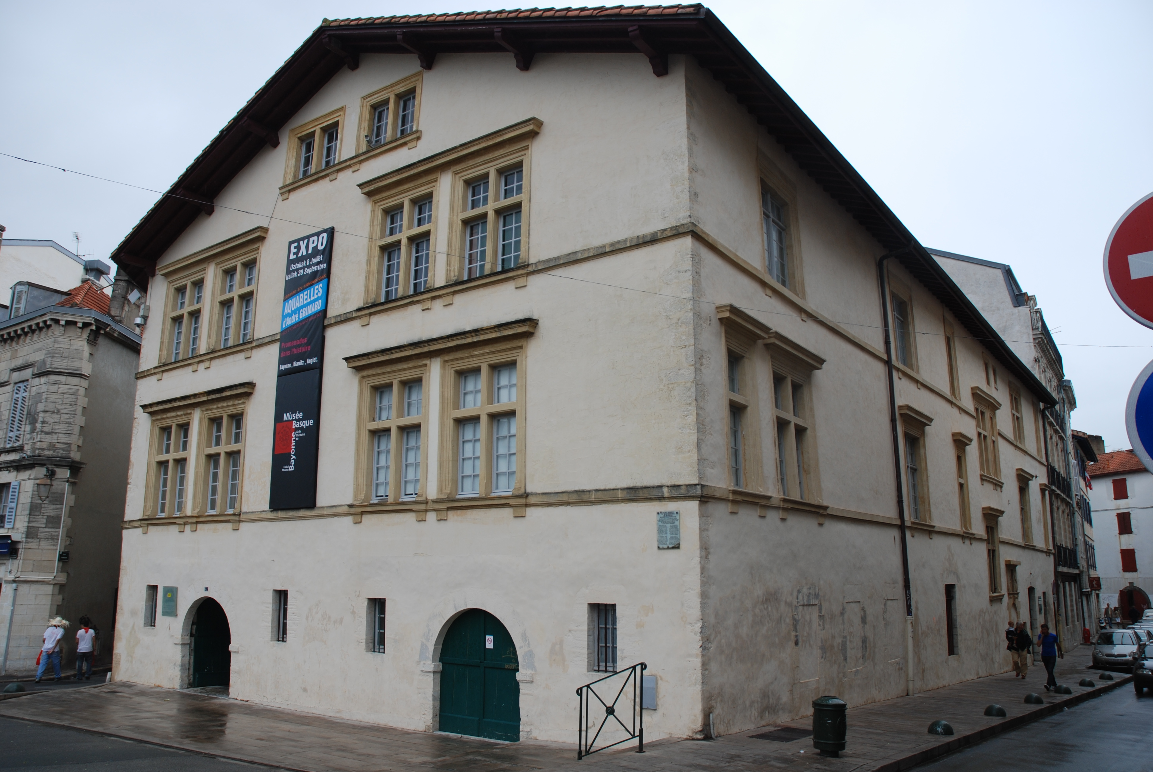 Bayonne, maison dite de Dagourette ou musée basque